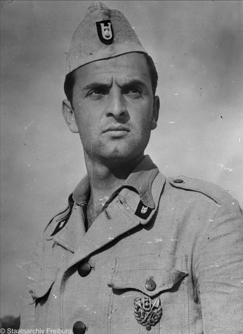 Propagandabild aus Kroatien, Kroatischer Arbeitsdienst-Mann, Signatur: Nr. 026025